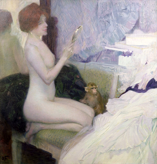 Vanity